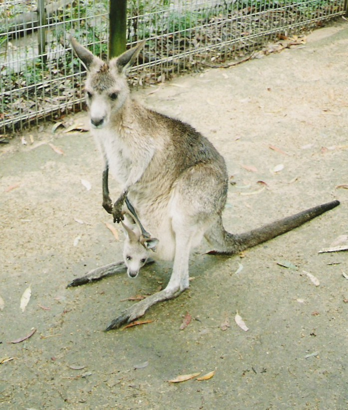 Wallaby mit Kind im Beutel, Australien.